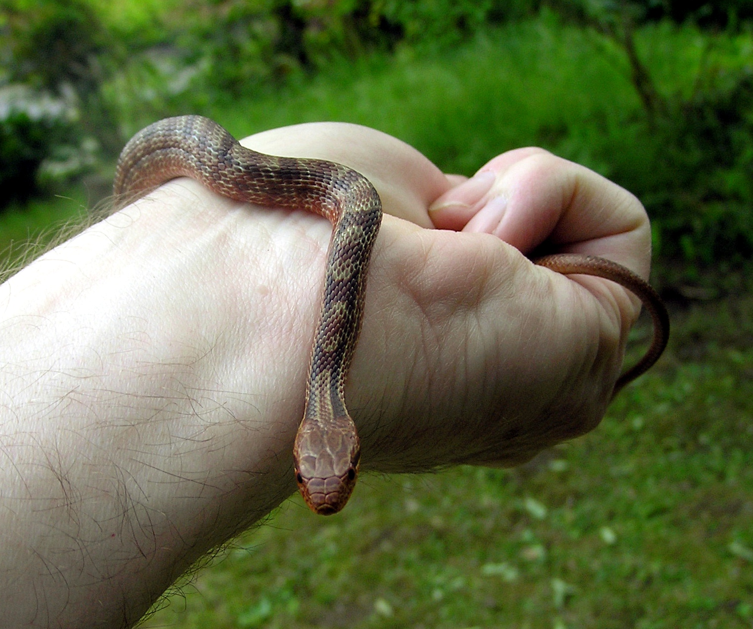 juvenile "shimahebi", Japanese Striped Snake, Elaphe quadrivirgata